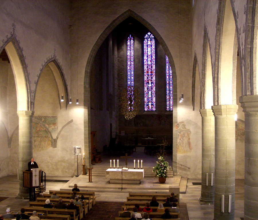 Ravensburg, Germany: Evangelische Stadtkirche, Innenansicht von der Orgelempore